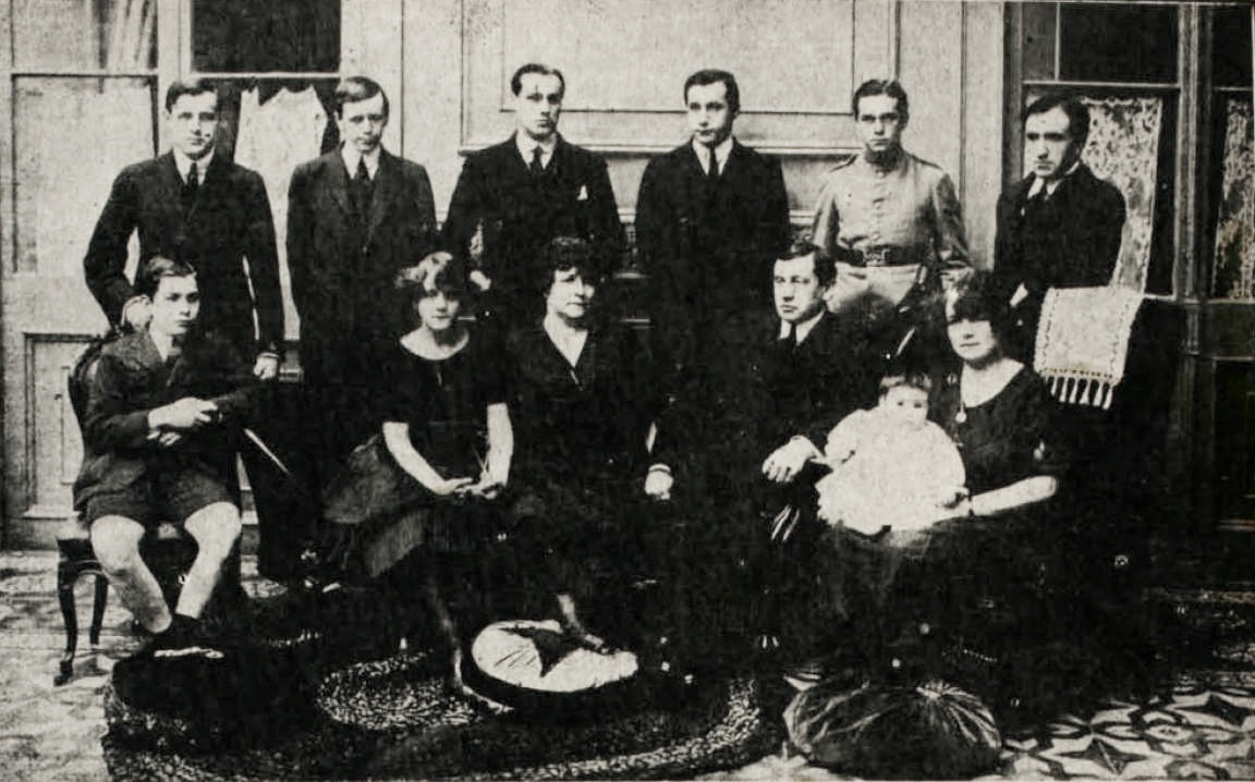 "El nuevo Presidente de la República de Chile y su familia (sentados), de izquierda a derecha: Mario y Marta Alessandri Rodríguez. La esposa de S.E: El excelentísimo señor Alessandri y señora Esther Alessandri de Matte, con su hijita. - (De pie): Señores Fernando, Arturo, Jorge, Hernán, Eduardo Alessandri R. y Arturo Matte Larraín.